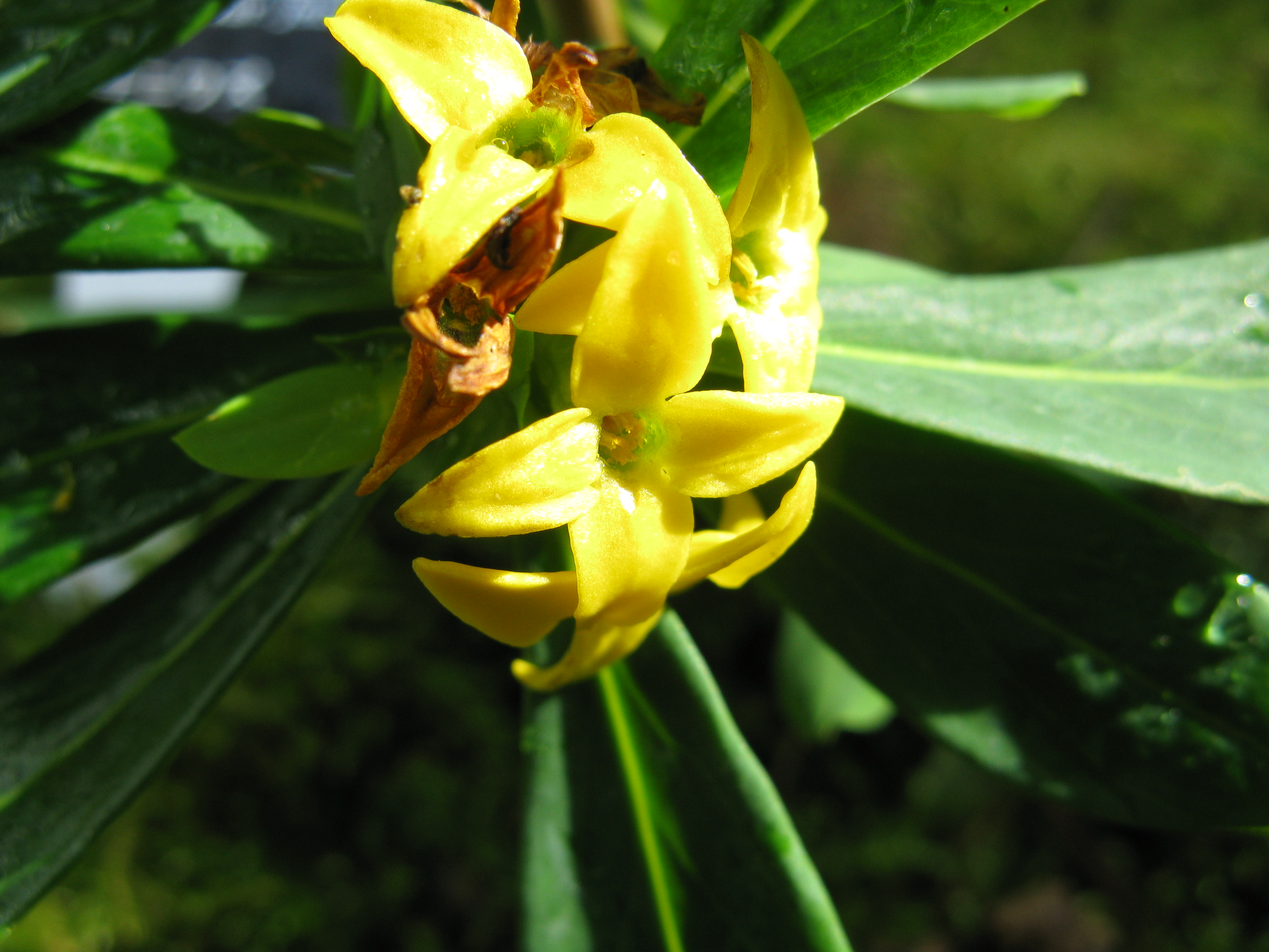 Daphne kamtschatica var. jezoensis